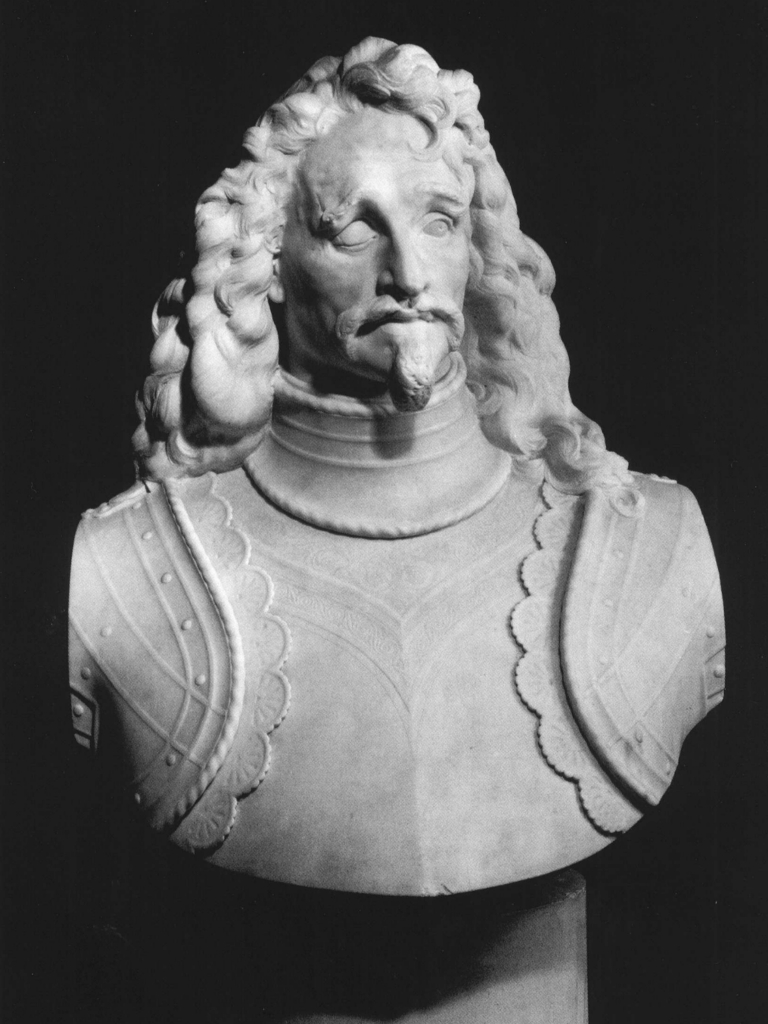 Busto di Lazzaro Mocenigo, opera di Luigi Borro (1874-1875). Il busto fa parte del Panteon Veneto, conservato presso Palazzo Loredan di Campo Santo Stefano a Venezia.